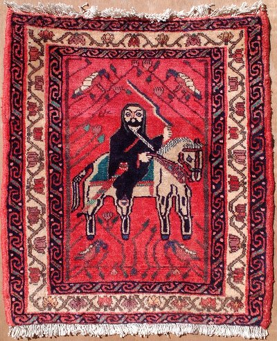 Deze foto van mijn eigen tapijt heb ik zelf gemaakt, u kunt deze foto ook vinden op mijn site ( met een beschrijving van het kleed. Correspondentie over het gebruik van deze foto kunt u voeren via via mijn site: Arie M. den Toom Ridderkerk 10 januari 2006